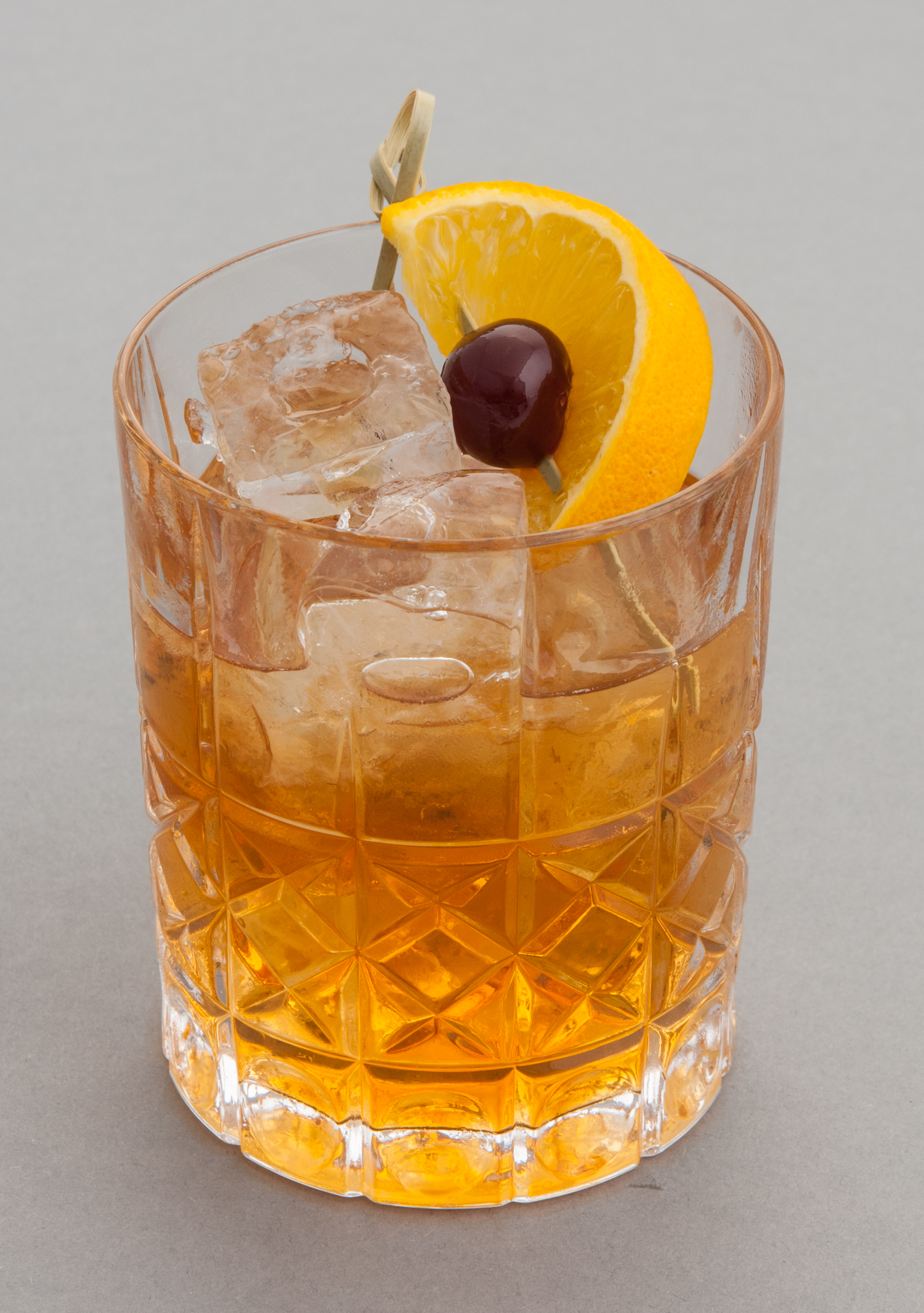 Old Fashioned